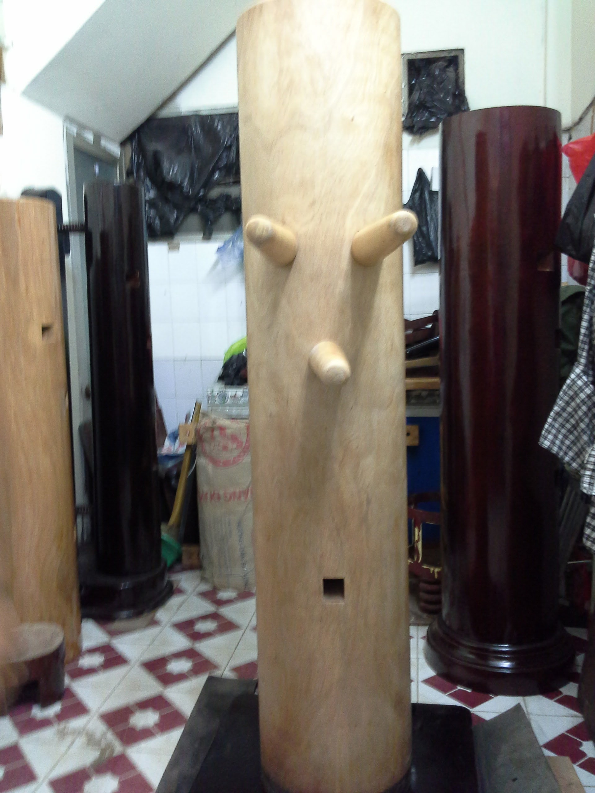 Mộc nhân Vĩnh Xuân quyền Việt Nam kiểu chôn đất, chất liệu gỗ xà cừ lõi, sơn mộc (hình chụp tại một shop chuyên dụng cụ tập luyện Vĩnh Xuân quyền ở Hà Nội, Việt Nam)